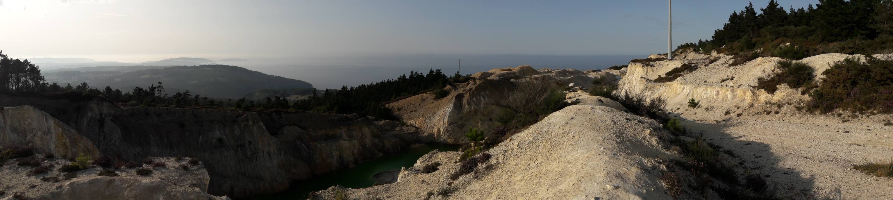 Panorámica dende o monte Neme